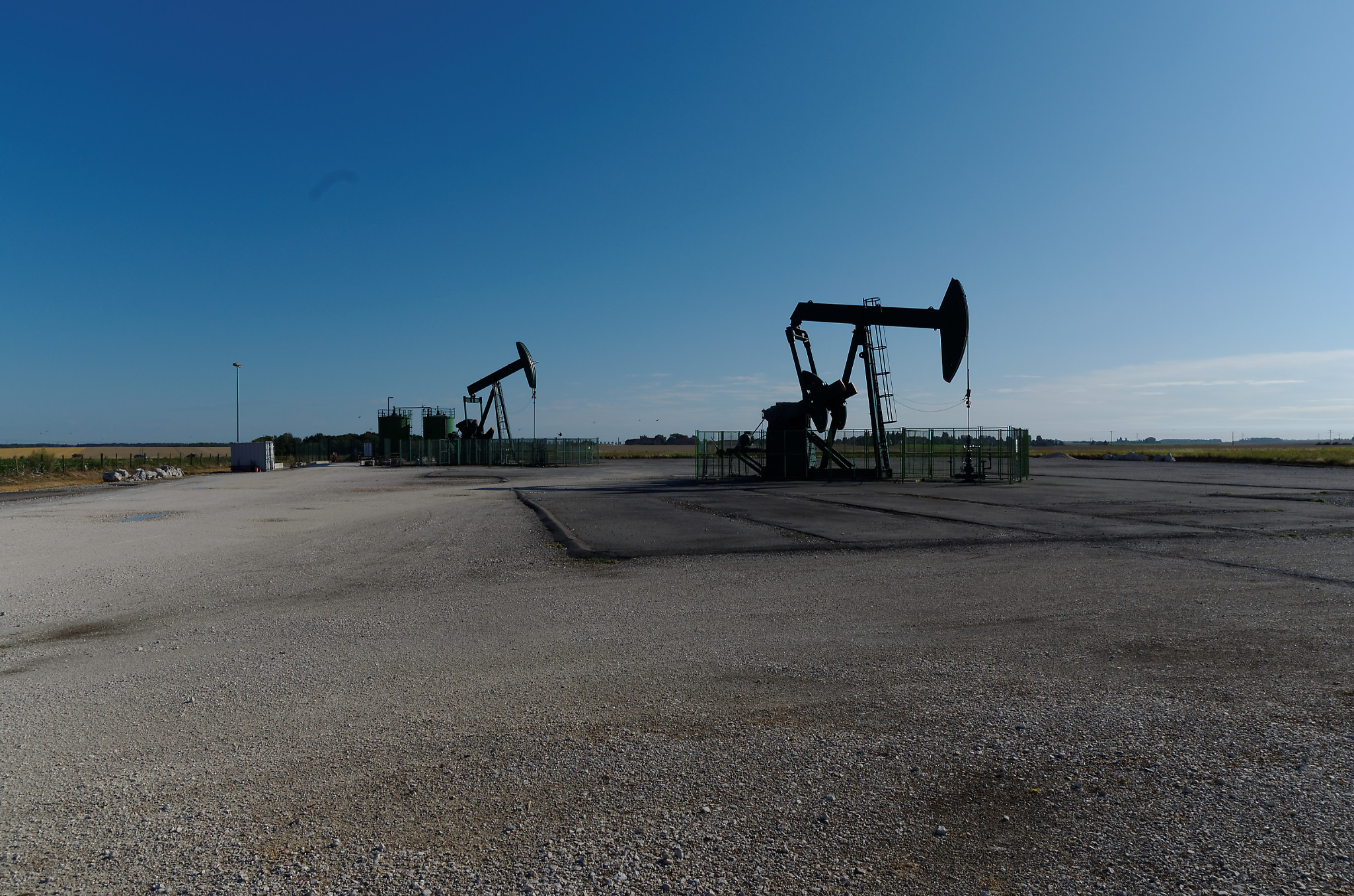 Chevalets de pompage (pumpjack) - Puit de pétrole à Jouy-le-Châtel